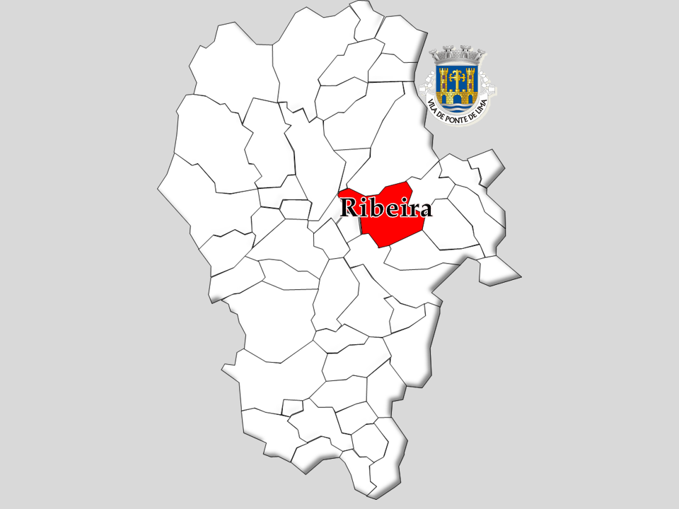 Censos 1864/2011